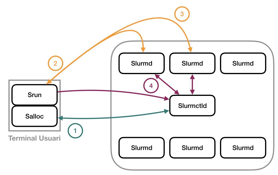 Comunicació salloc, slumrd, slurmcltd